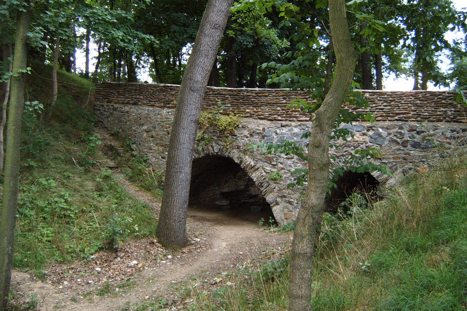 Renesanční vstupní most